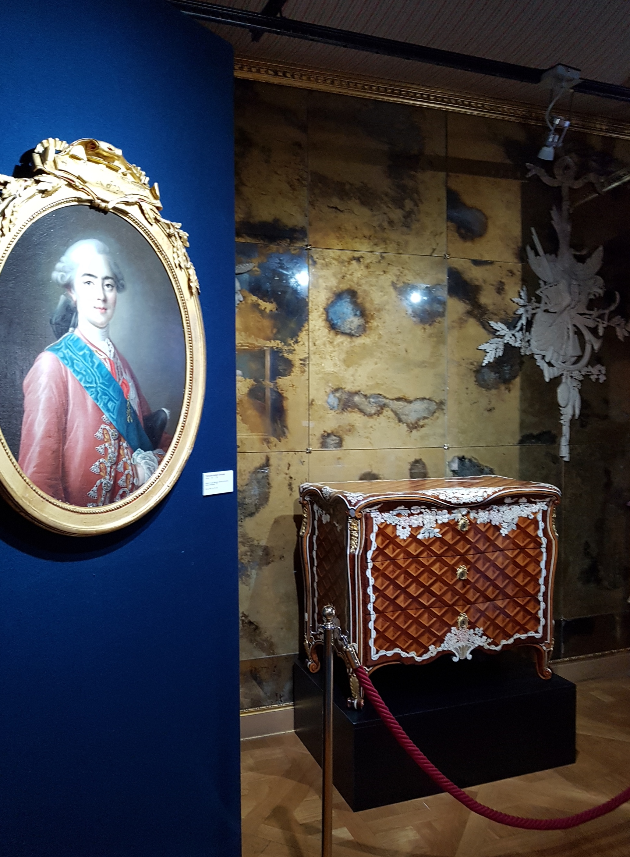 Buduoir Christian Dior, Museo di Arti Decorative Accorsi–Ometto, Torino